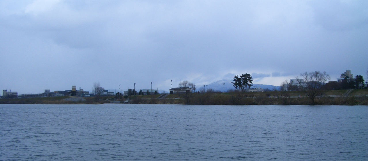 現在の桂川の河原周辺